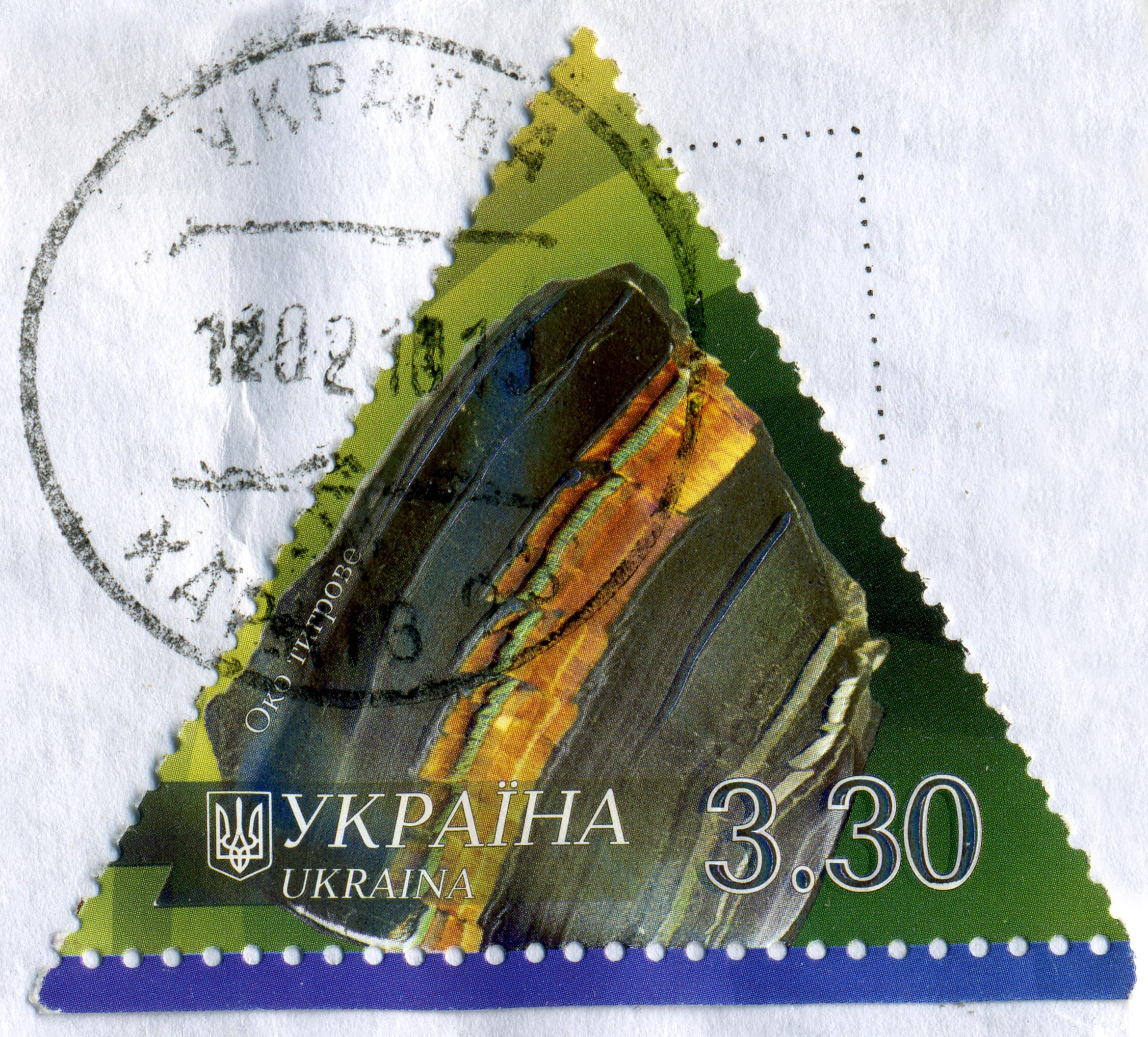 Треугольная почтовая марка Украины из серии "Минералы". Номинал 3 гривны 30 копеек. 2009 год. Тигровый глаз. Харьковское гашение 12 февраля 2010.